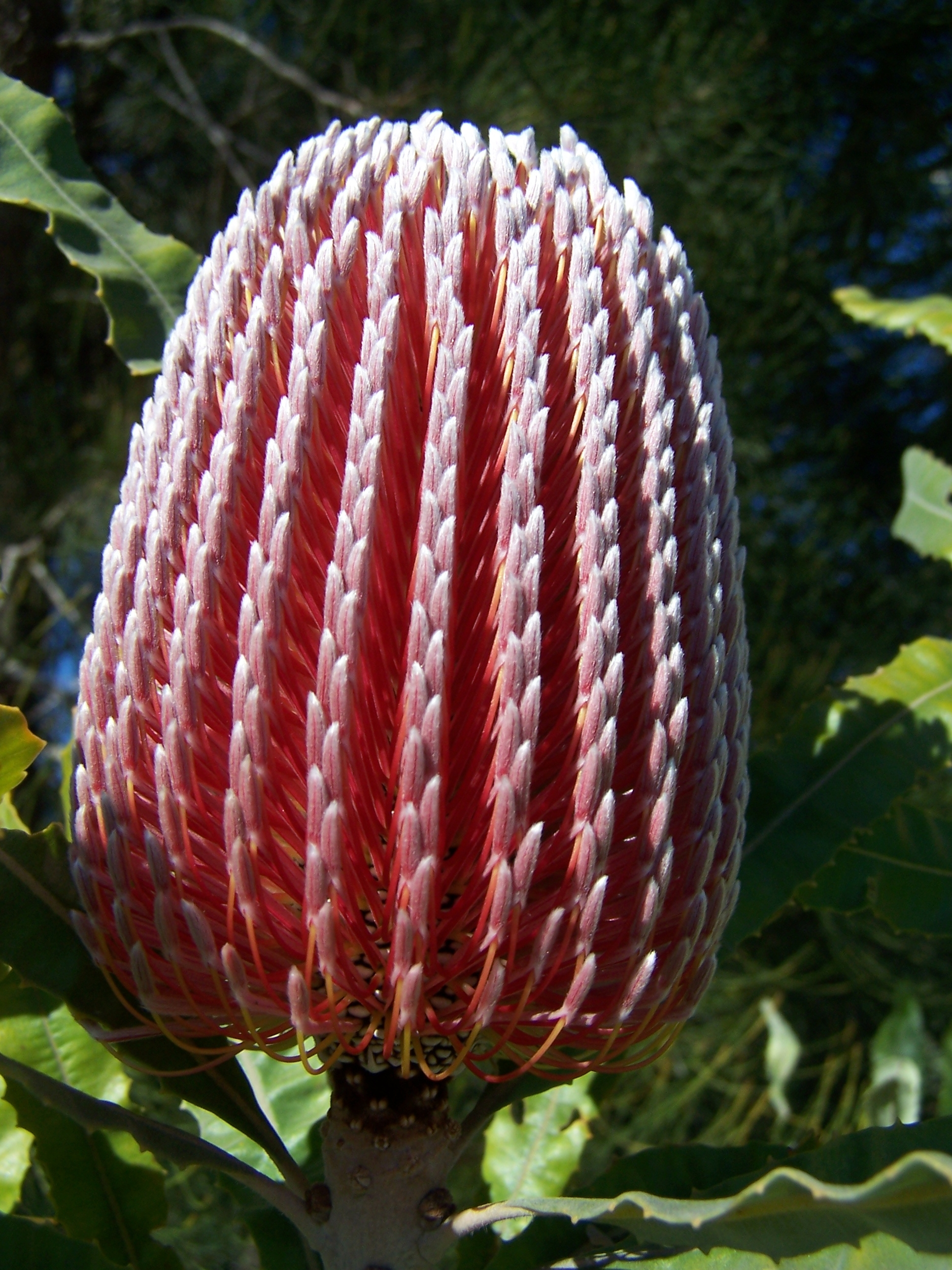 Banksia menziesii